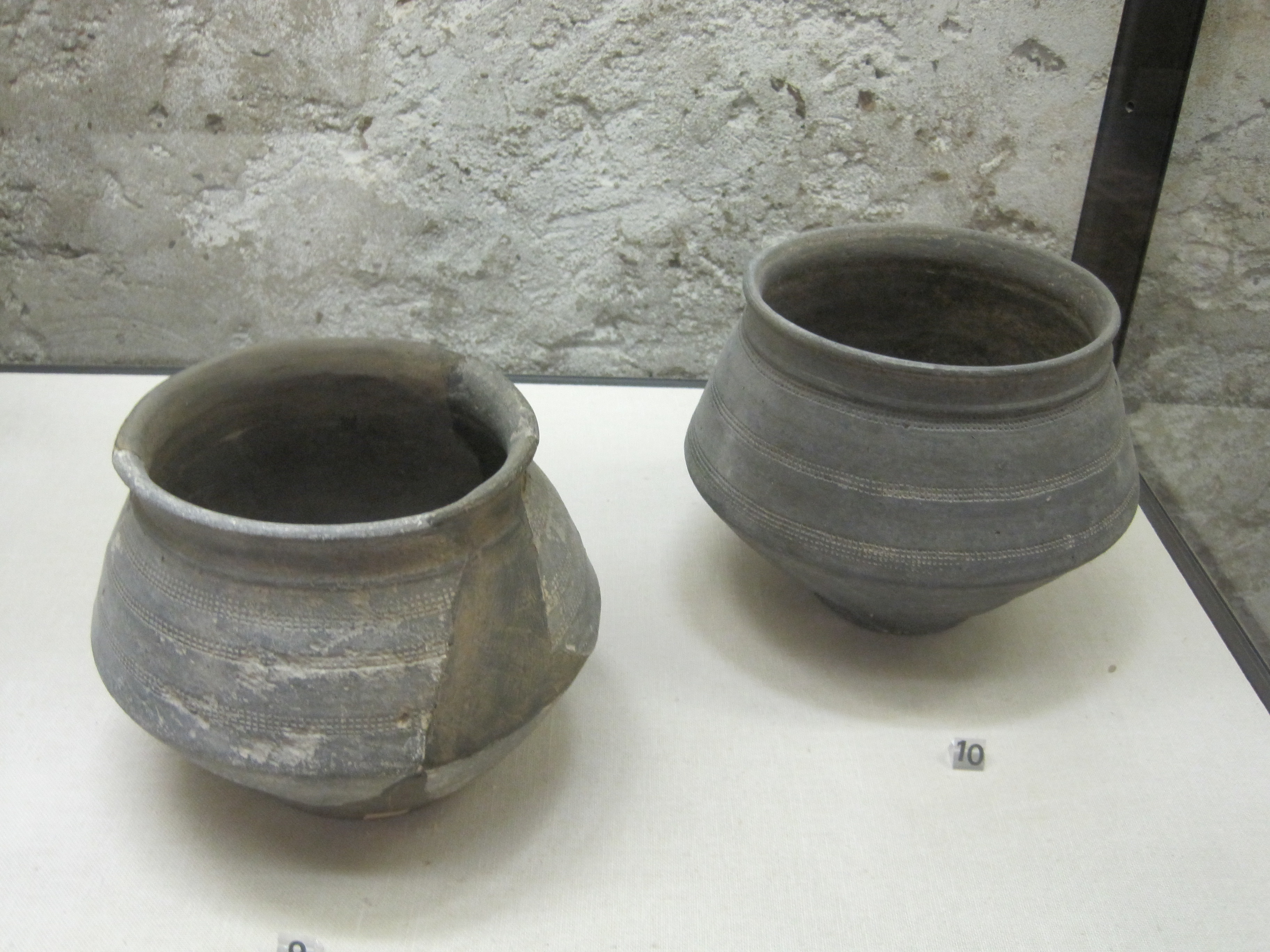 Knickwandtöpfe, 6.-7. Jh.. Merowingerzeitliches Gräberfeld / Fränkischer Friedhof Brentanostraße/Beinweg in Geisenheim. Funde im Museum Brömserburg, Rüdesheim am Rhein